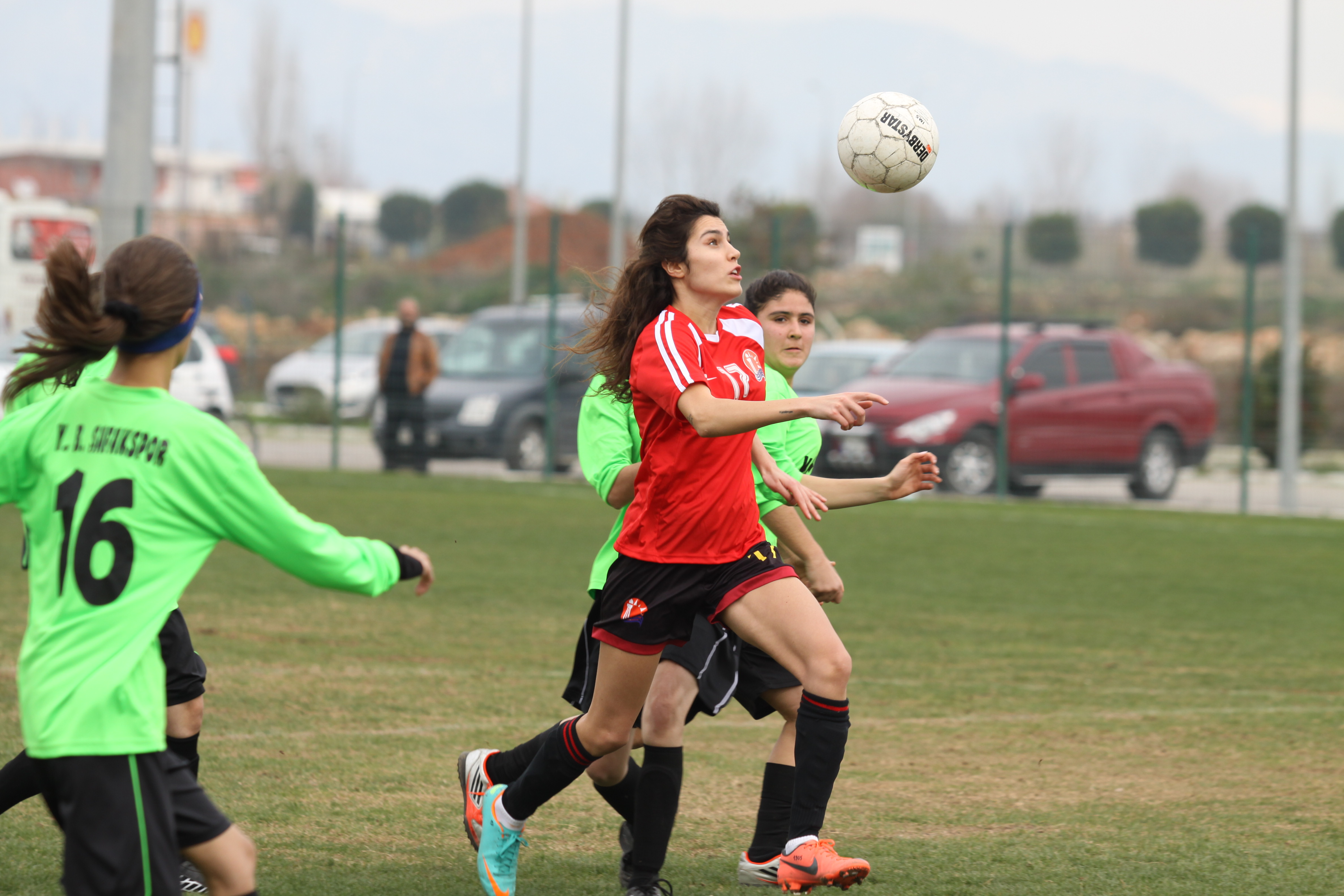 1. LİG'DE BAŞARIYA